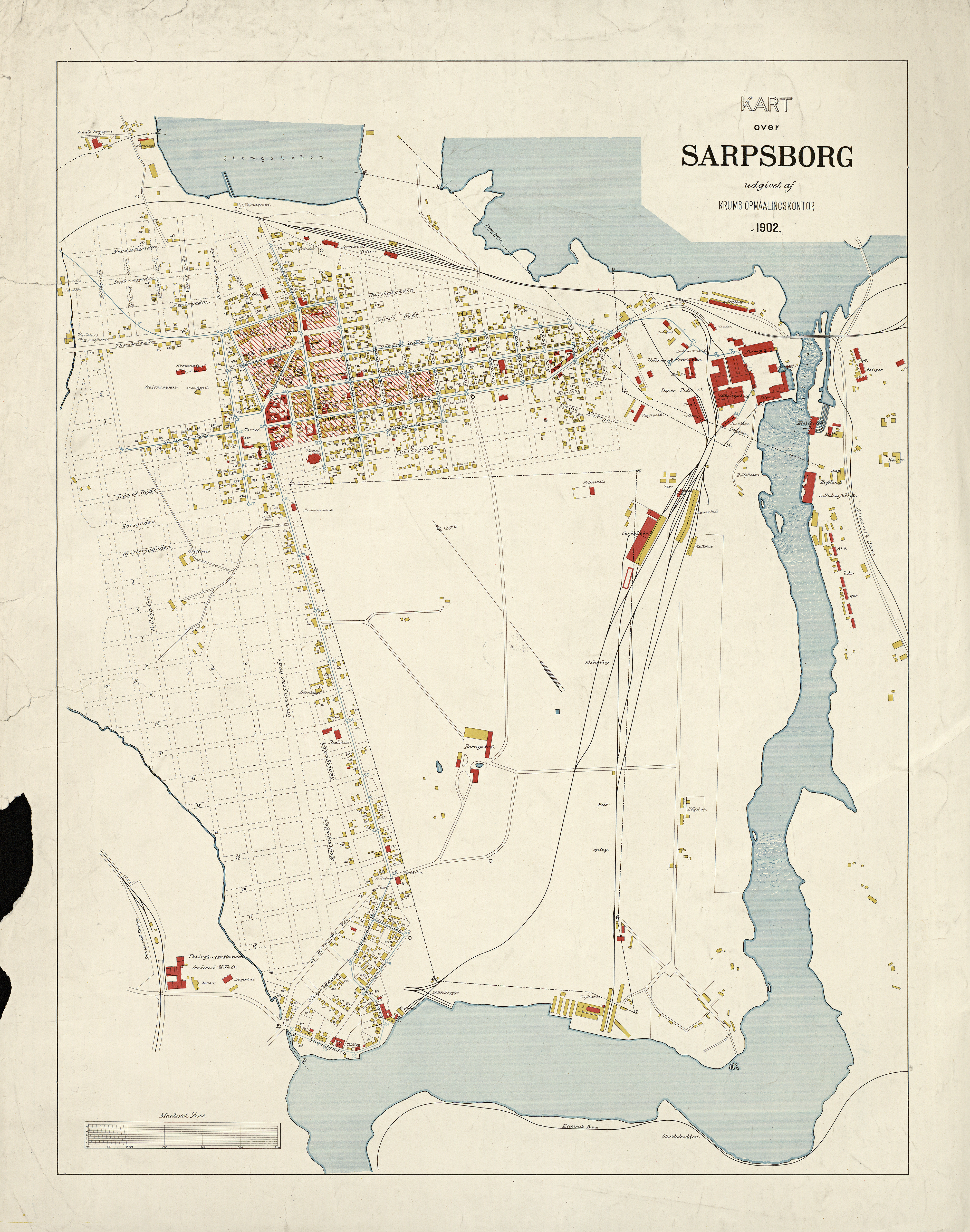 Kart over Sarpsborg (1902)